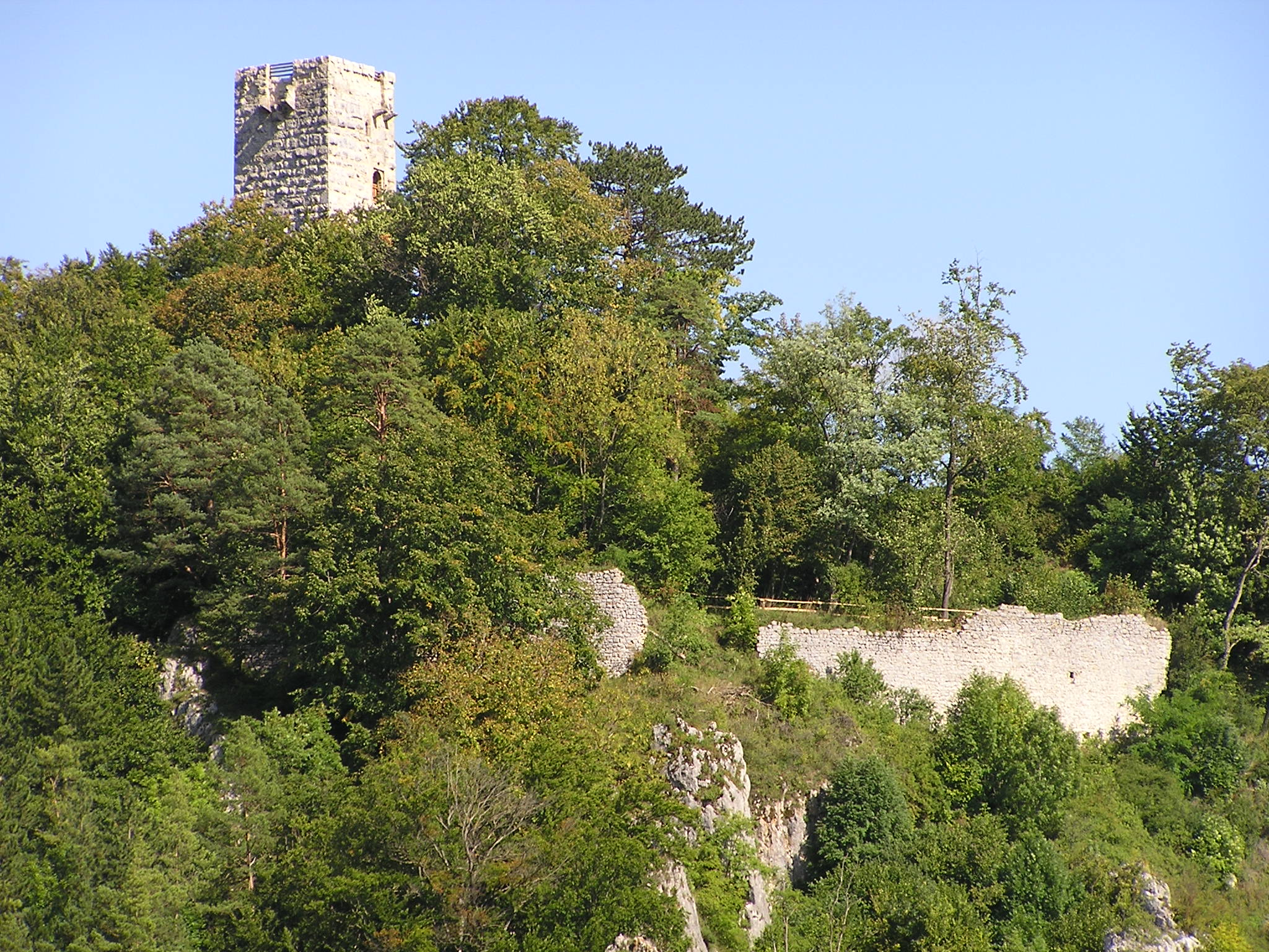 Teile der Befestigungsanlage der Burgruine Hohenschelklingen vom Herz-Jesu-Berg aus Fotografiert in Schelklingen, selbst Fotografiert, 05.09.2006, Alexander Förstner